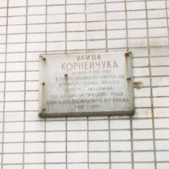 Москва, ул. Корнейчука, памятная доска на доме 32, начало 2000-х